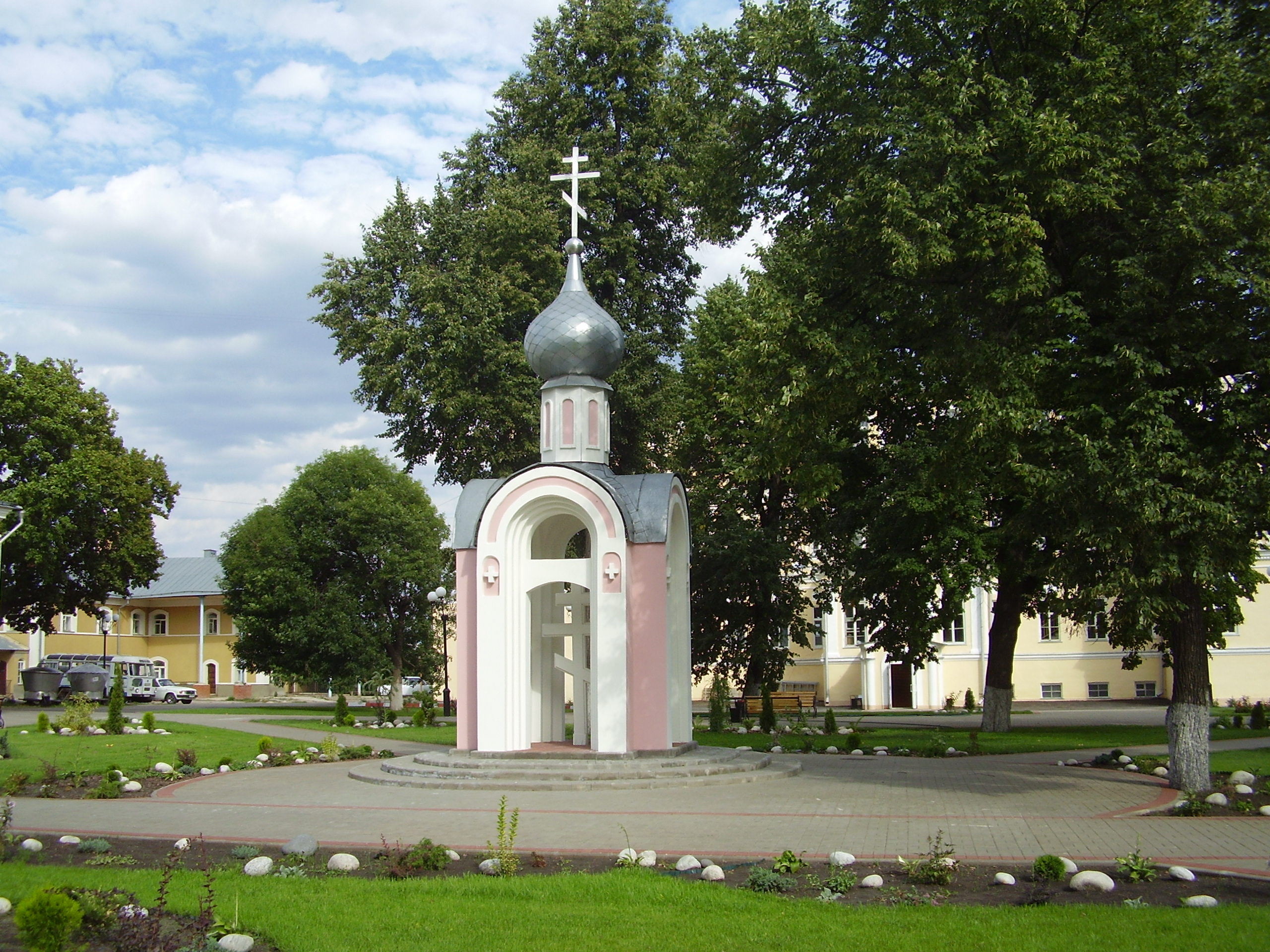 Тамбов,во дворе Казанской церкви